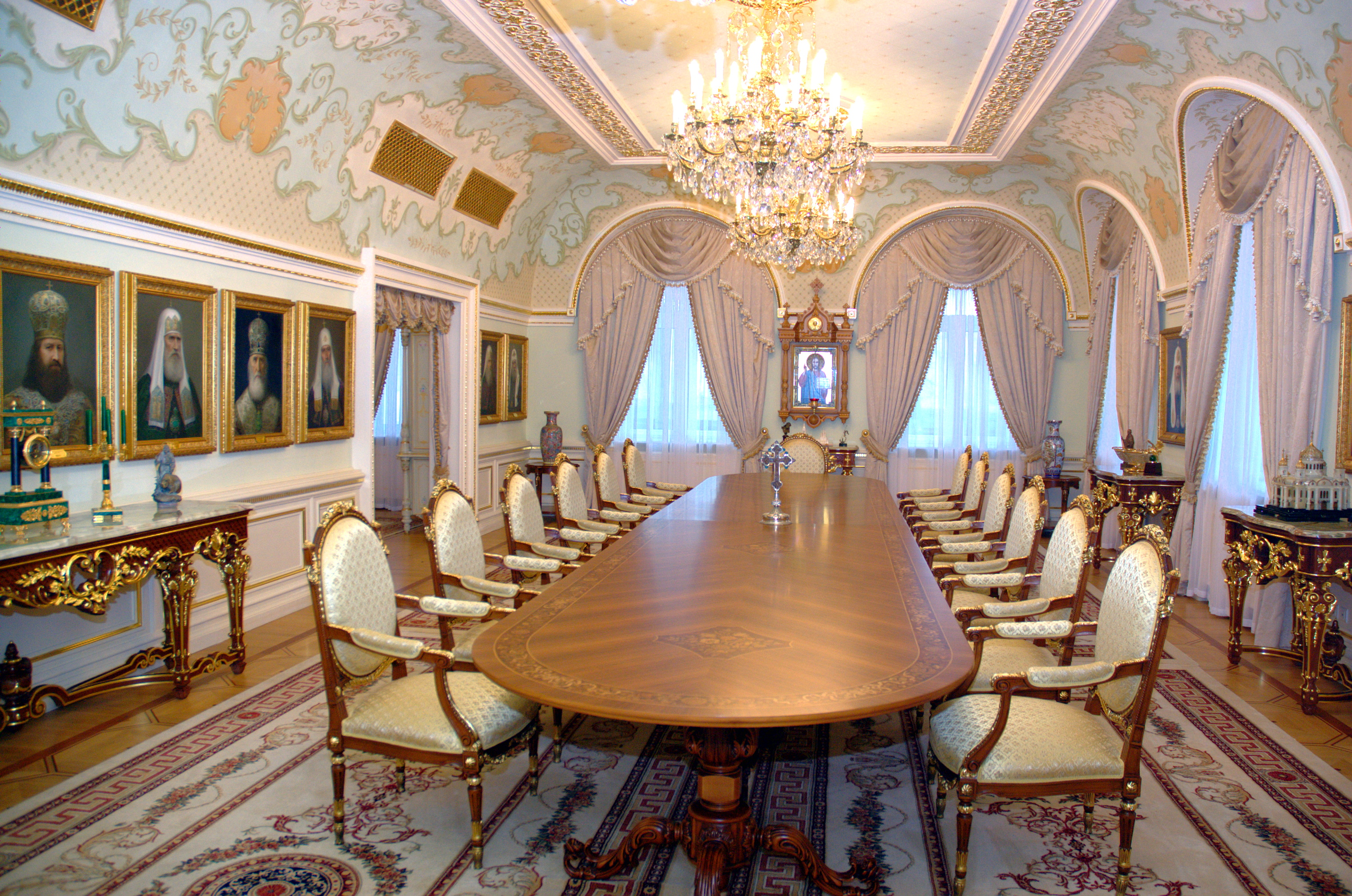 Зал заседаний Священного Синода Русской Православной Церкви в Переделкине.